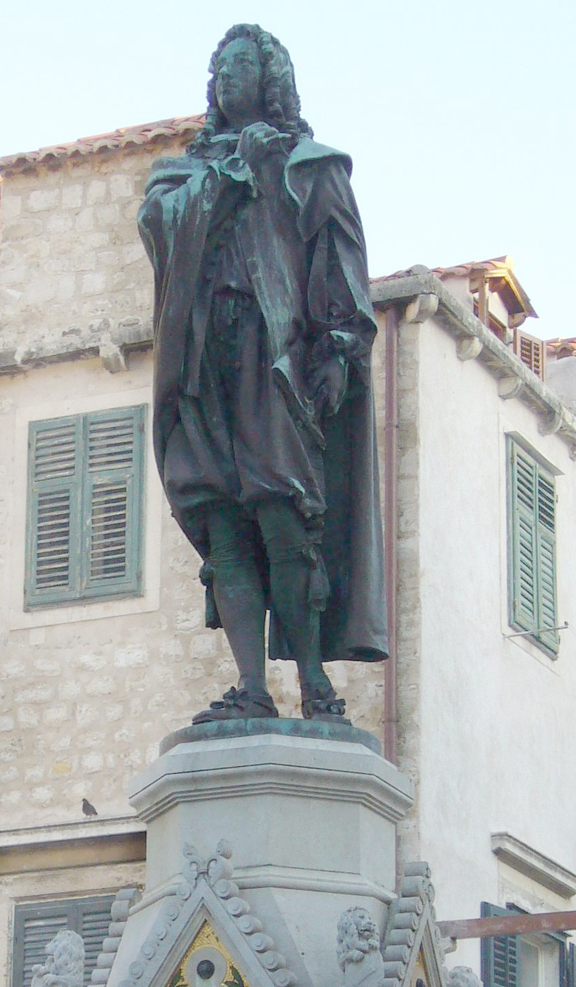 Fran Gundulic